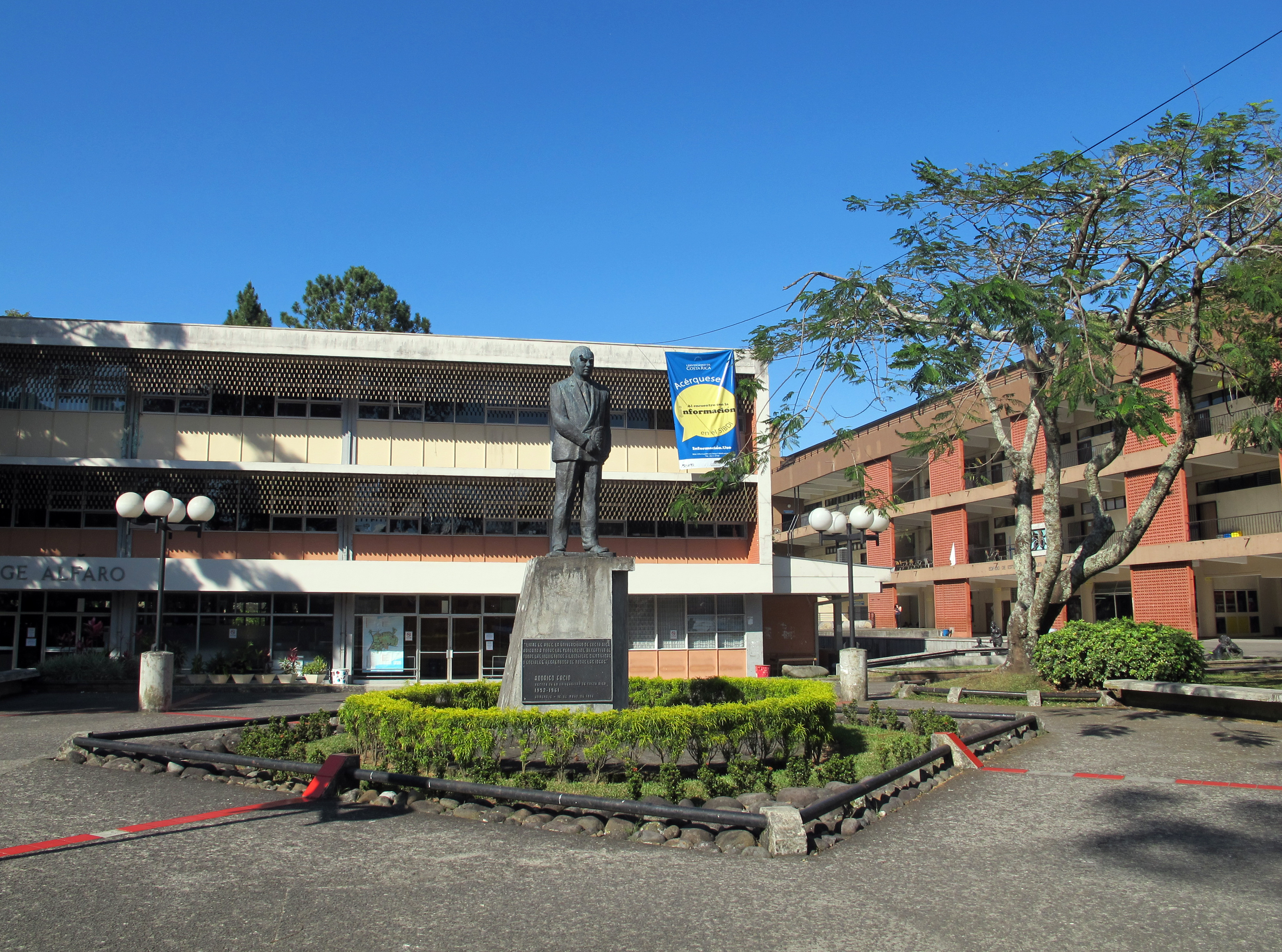 Norsk (bokmål): Ciudad Universitaria Rodrigo Facio, Universidad de Costa Rica, i San Pedro de Montes de Oca i Costa Rica. I midten står en statue av Rodrigo Facio, som campusen er oppkalt etter. Til venstre er Biblioteca Carlos Monge Alfaro, og til høyre bygninga til Escuela de Estudios Generales.